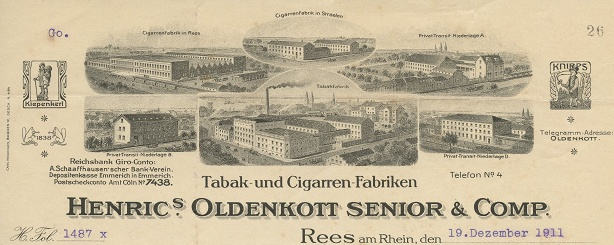 Oldenkott